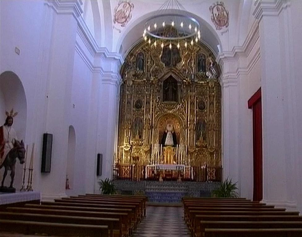 Convento de San Francisco